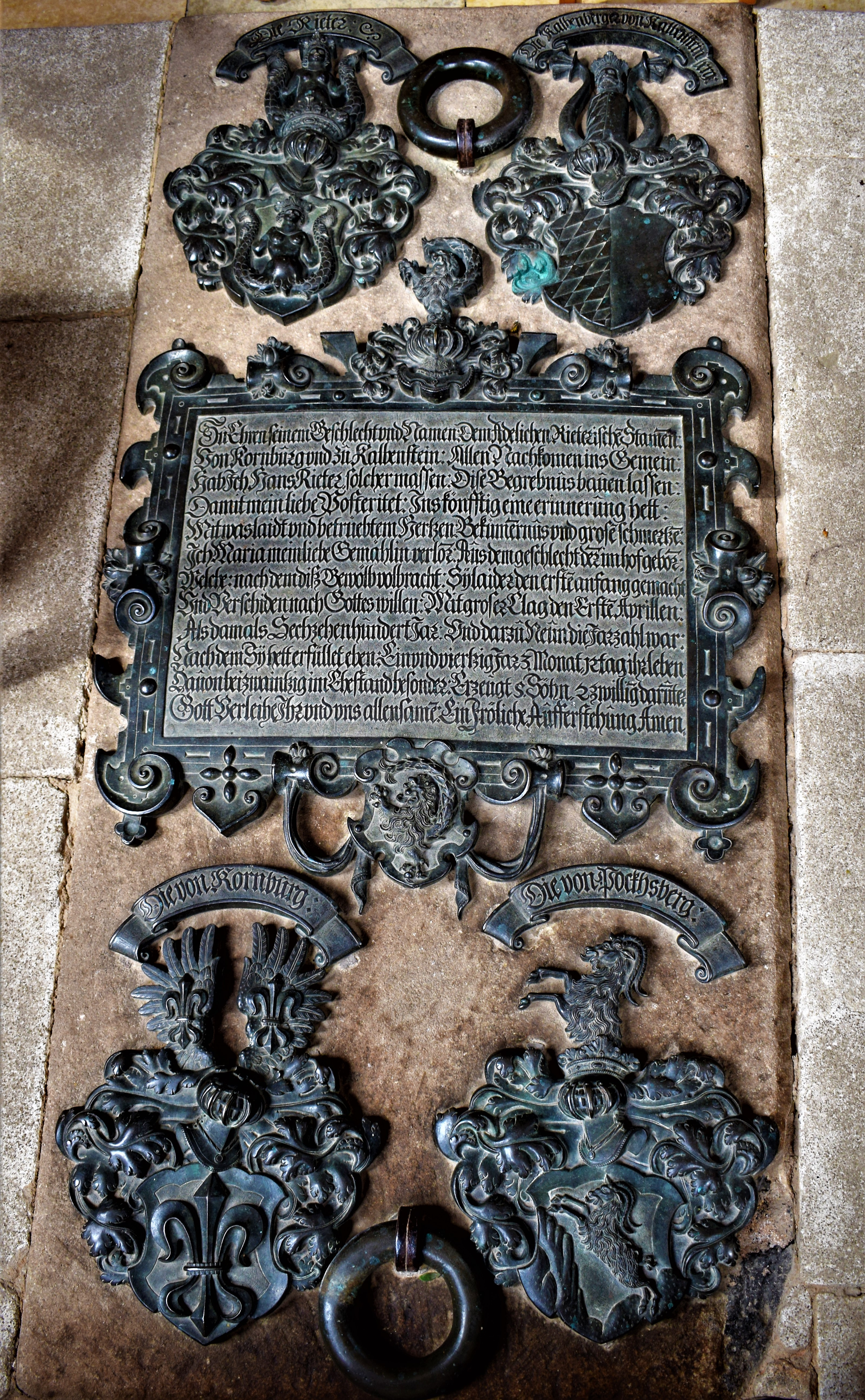 Rieterkirche Kalbensteinberg, Steinplatte mit Bronzebeschlägen, die den alten Zugang zur 1609 angelegten Gruft abdeckt. Über und unter einer Inschrifttafel sind die Wappen der Rieter und die von Kalbenberg, Kornburg und Bocksberg. Am unteren Rand der Inschriften ist das Imhofsche Wappentier, der Seelöwe, dargestellt